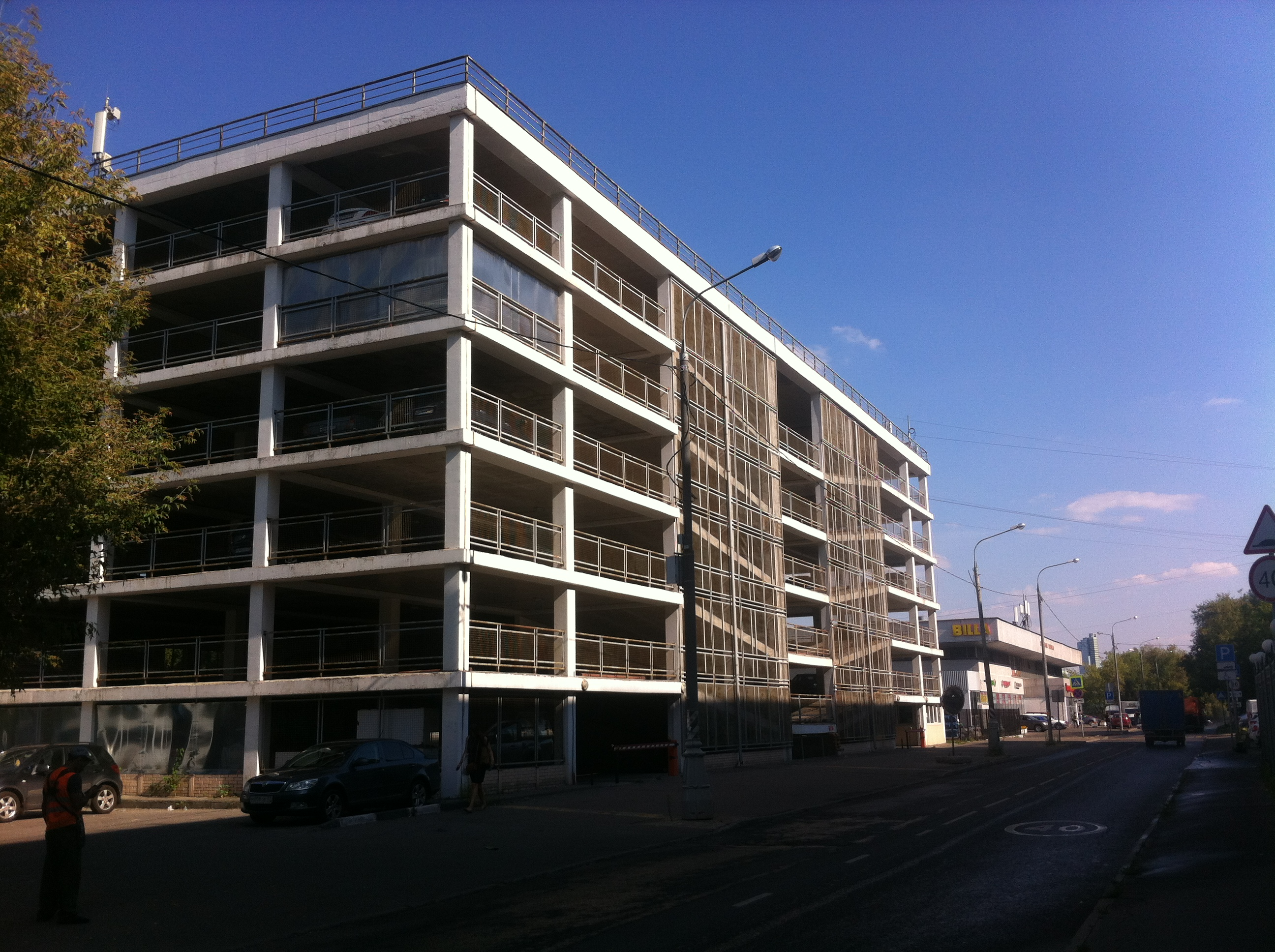 Многоэтажная стоянка в Москве. Район Сокольники, Колодезный переулок, 3Б.